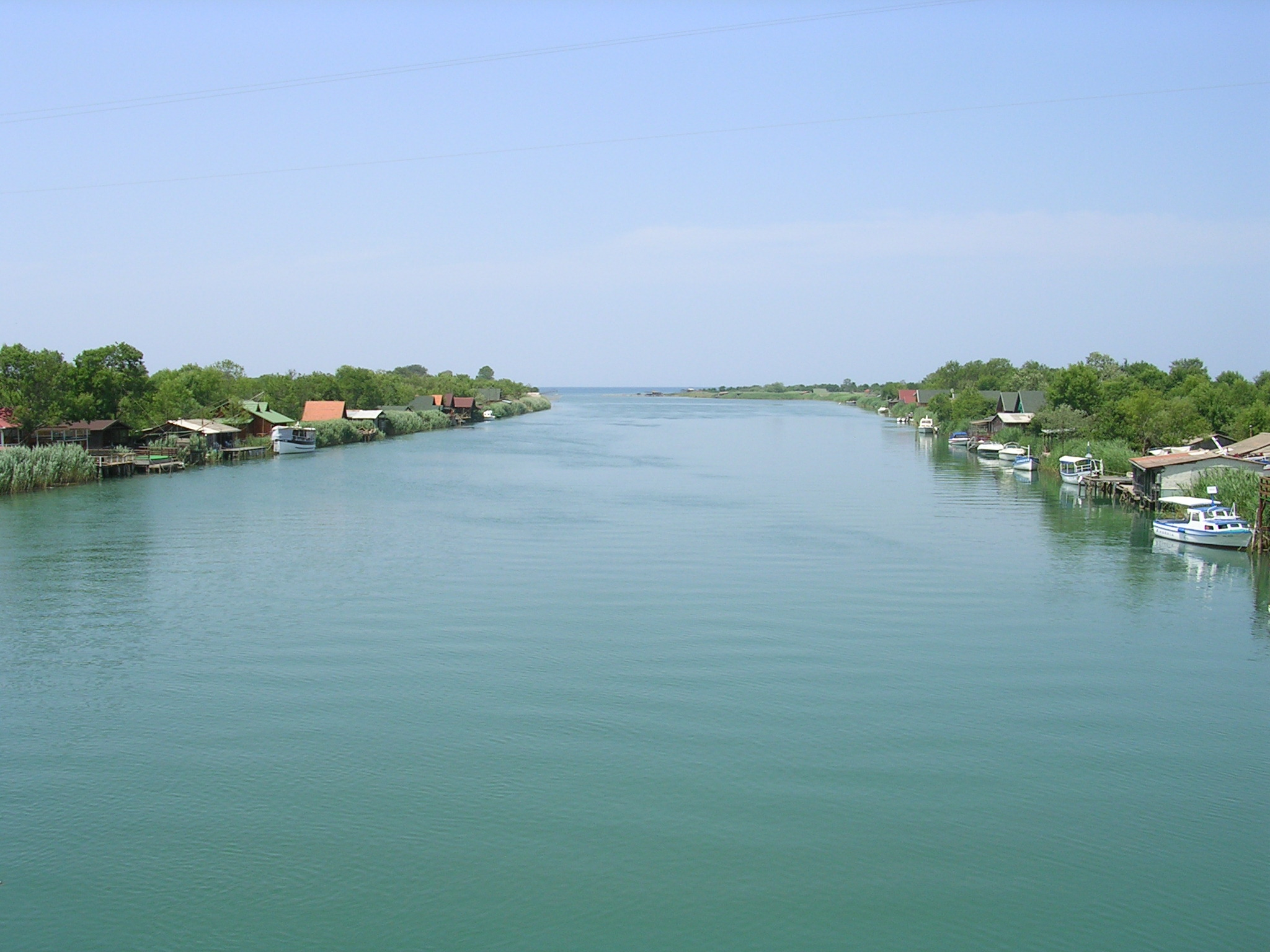 Bojana kod Ulcinja